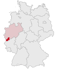 Kreis Euskirchen, North Rhine-Westphalia, Germany